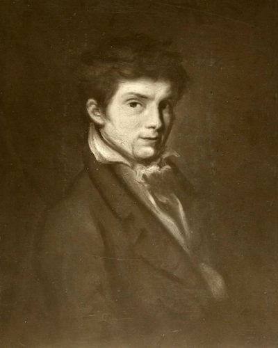 Zelfportret Christiaan van Geelen (1794-1826)